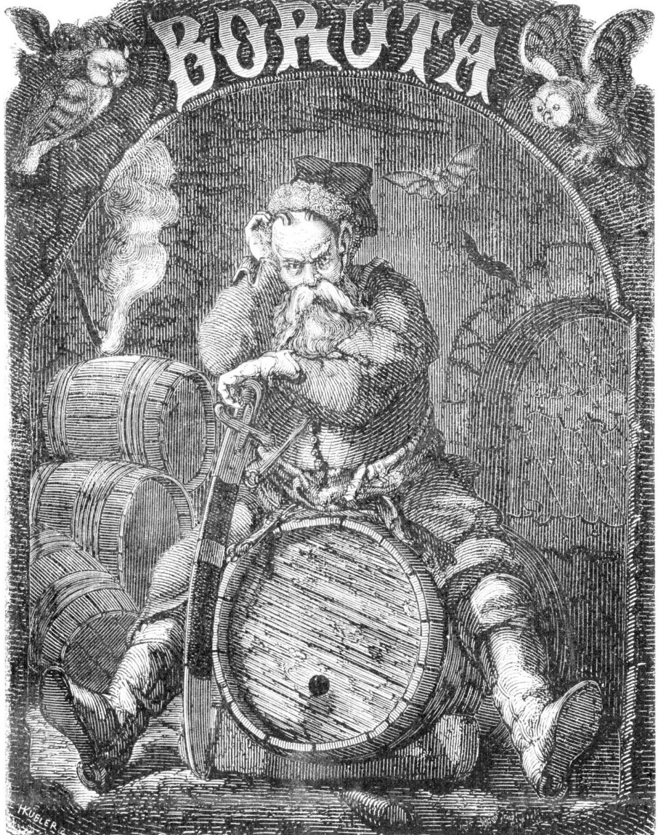 Diabeł Boruta. Drzeworyt z Tygodnika ilustrowanego wg pomysłu Juliusza Kossaka rytował H. Kubler